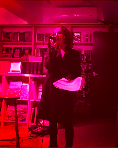 Olivia Tapiero en lecture à la librairie Le Port de tête, Montréal, 26 octobre 2018.